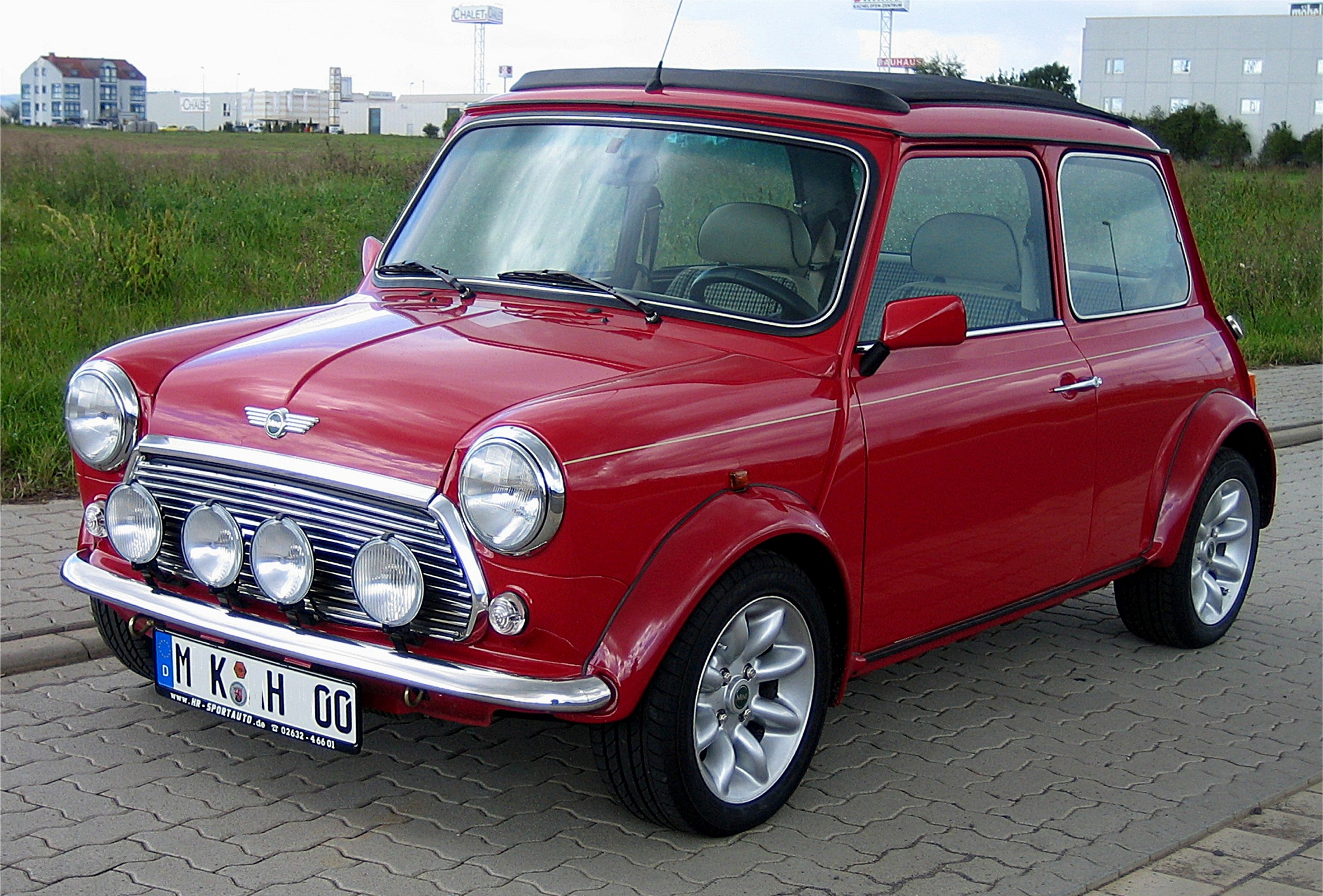 Bildbeschreibung: Austin Mini, Baujahr 2000